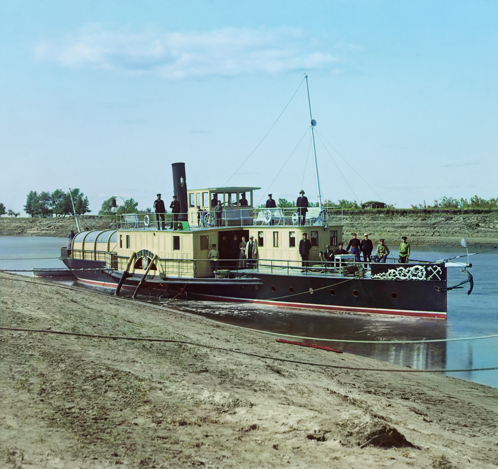 Пароход «Тюмень» Министерства Путей Сообщения. 1912 год